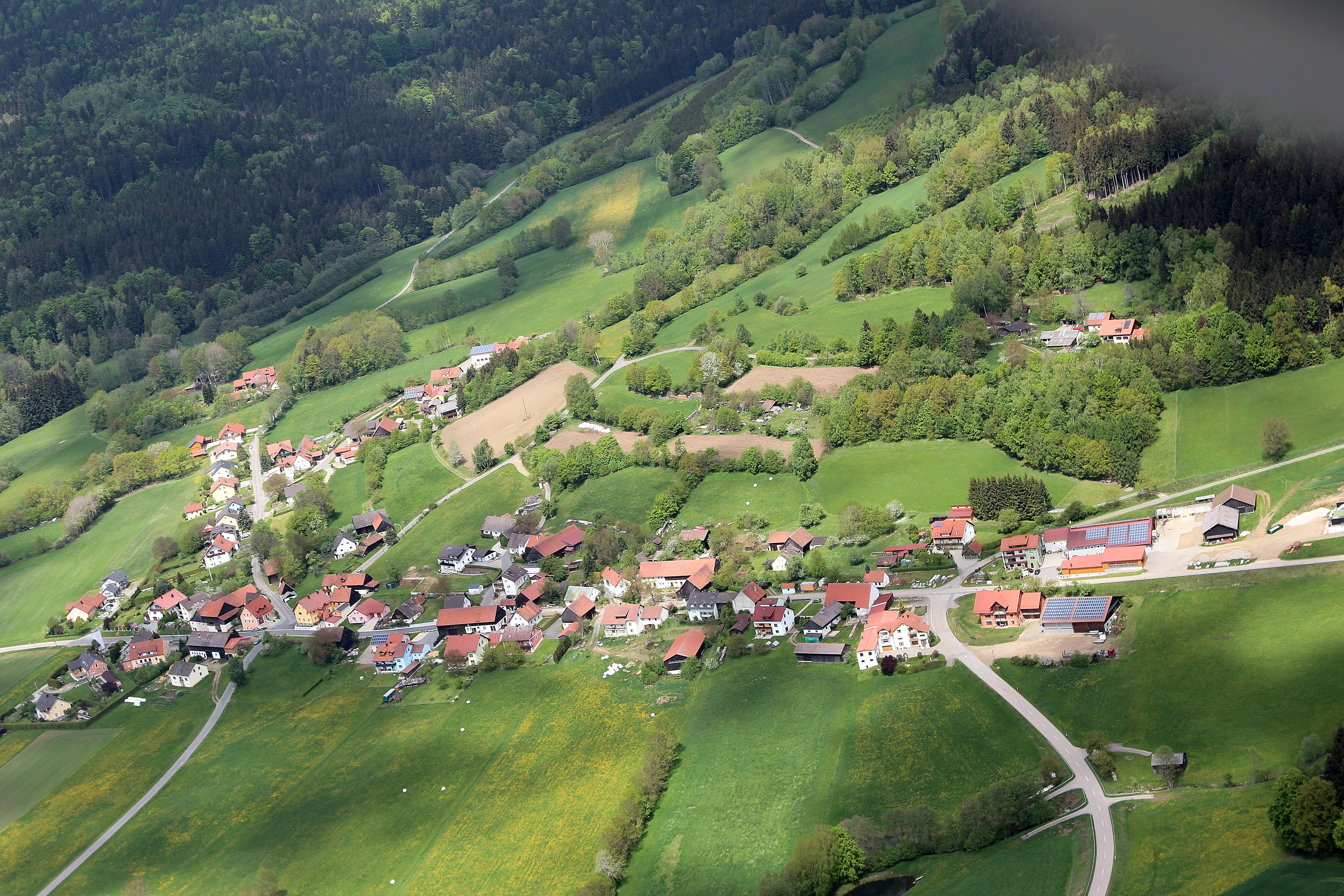 Kühried, Gemeinde Teunz, Landkreis Schwandorf, Oberpfalz, Bayern (2015)